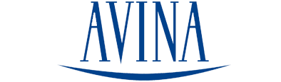 Logo Fundación Avina